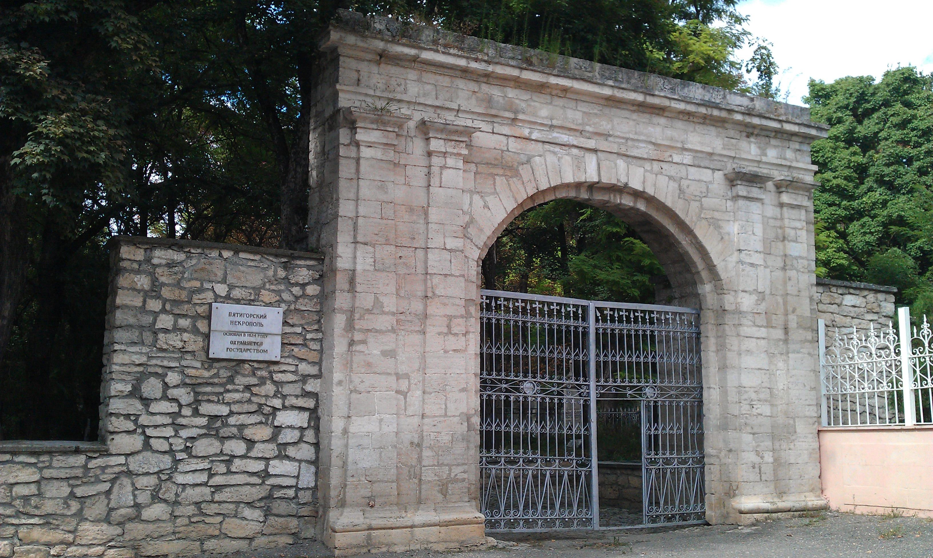 Вход со стороны Лазаревского храма.